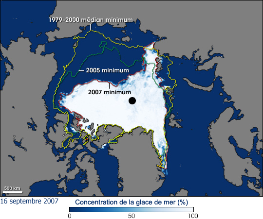 Cette image montre l'Arctique ainsi que l'a relevé l'Advanced Microwave Scanning Radiometer pour EOS (AMSR-E) de la NASA à bord de satellite Aqua, le 16 septembre 2007. L'image montre un minimum record de la glace de mer dans l'Arctique.